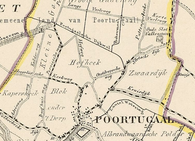 Gemeente-Atlas van Nederland naar officieele bronnen bewerkt, Poortugaal